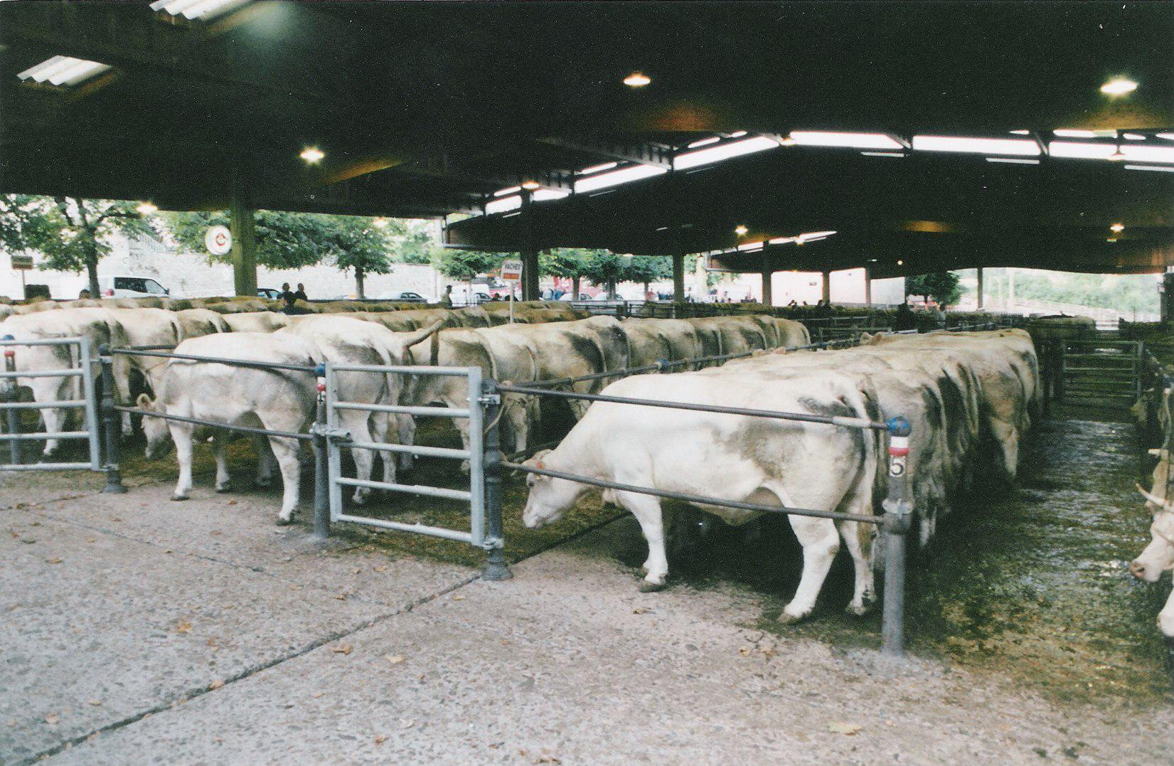 Le marché aux boeufs de Saint-Christophe-en-Brionnais (France)